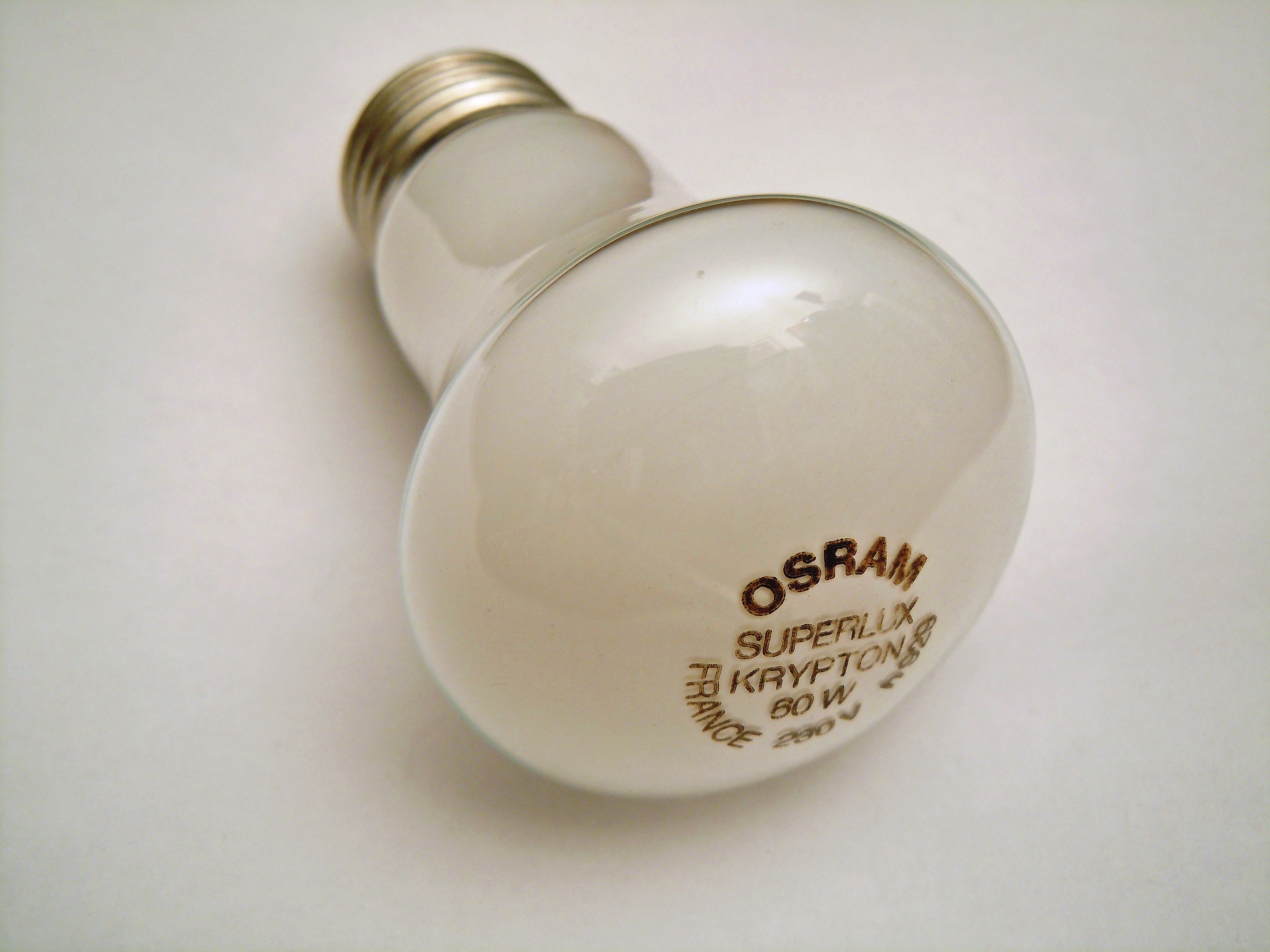 lampadina OSRAM del 2005 con le seguenti caratteristiche: bianca; da 60W; con virola Edison a passo grosso; con Krypton all'interno del bulbo.